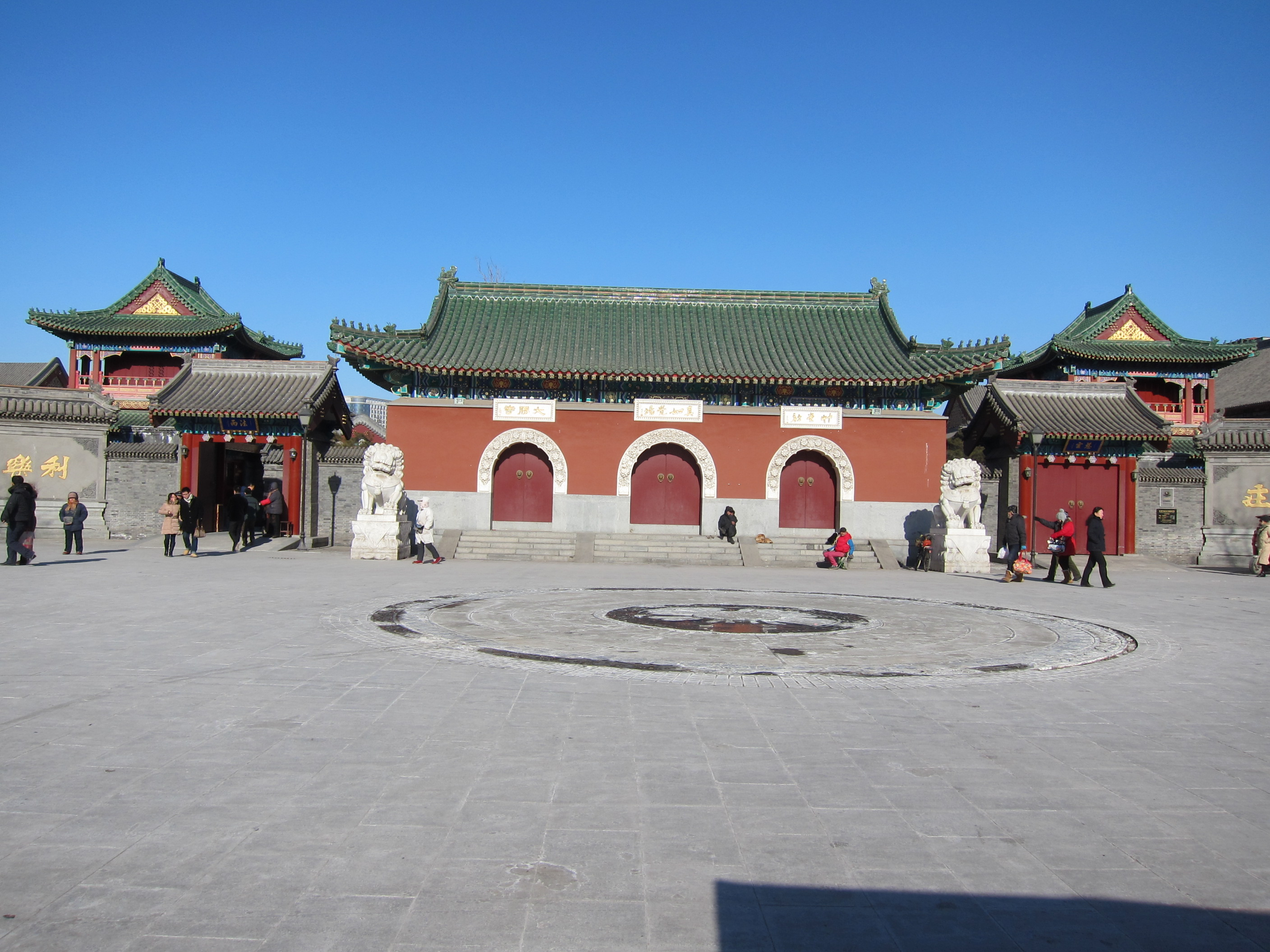 大悲禪院正門中文（中国大陆）: 大悲禅院正门